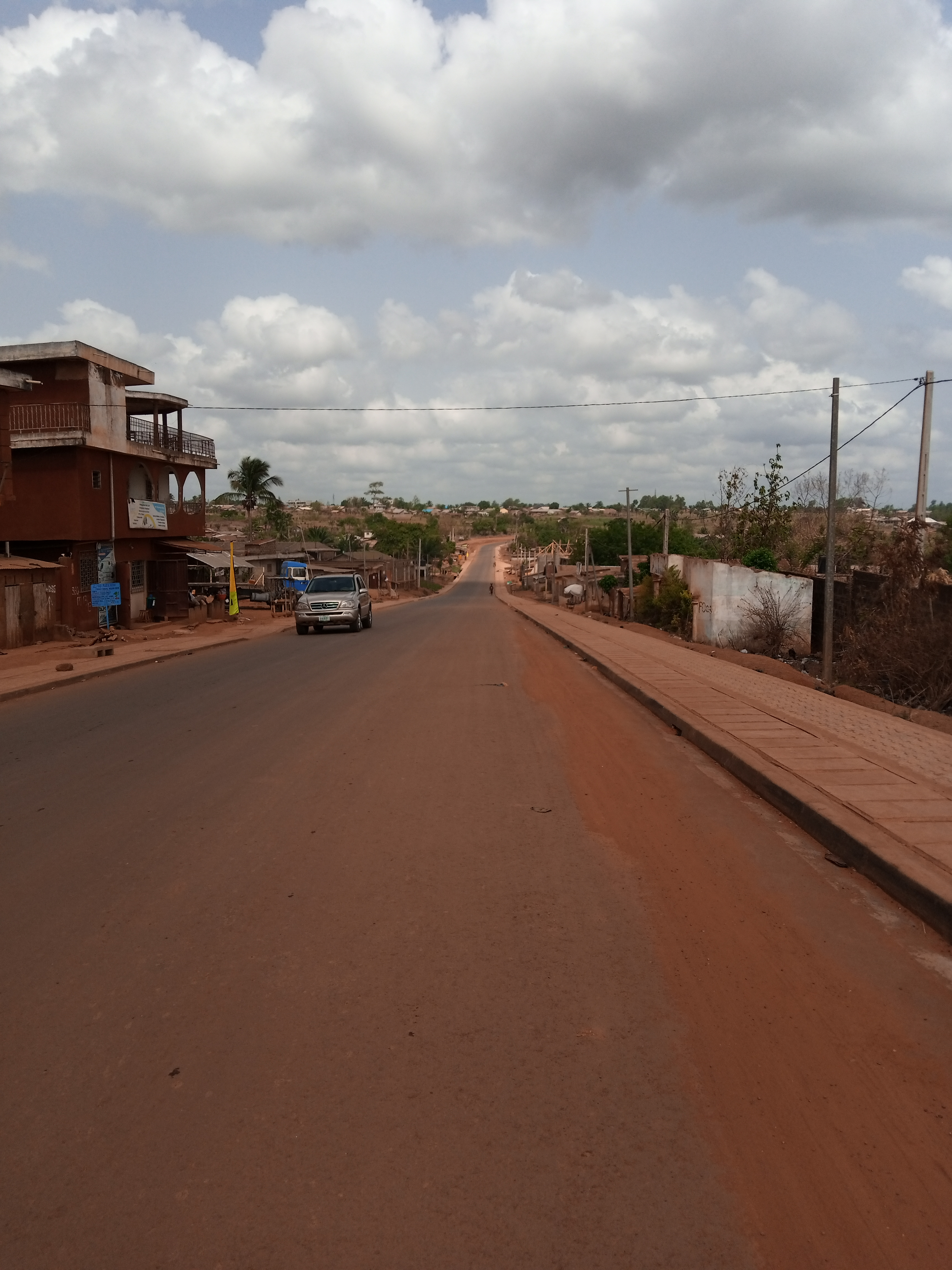 voie Pobé onigbolo This is an image with the theme "Africa on the Move or Transport" from: Benin